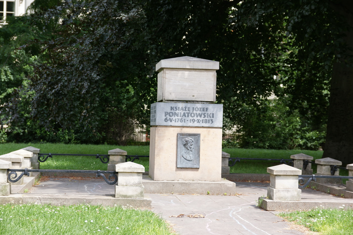 Pomnik księcia Józefa Poniatowskiego w Lipsku, wzniesiony w 1834, zburzony przez Niemców w 1939 roku, stan obecny z 2013 - skwer Poniatowskiego (Poniatowski Plan)